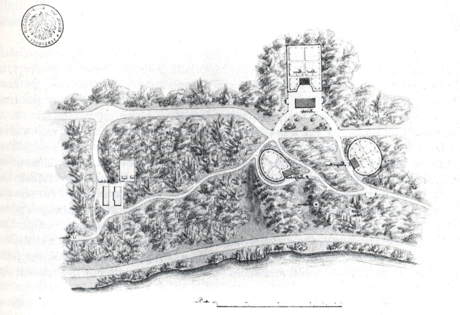 Erste Lageskizze zu den Bauten Nikolskoe, Gustav Koeber nach Lenné, SPSG Plk, 1832/33